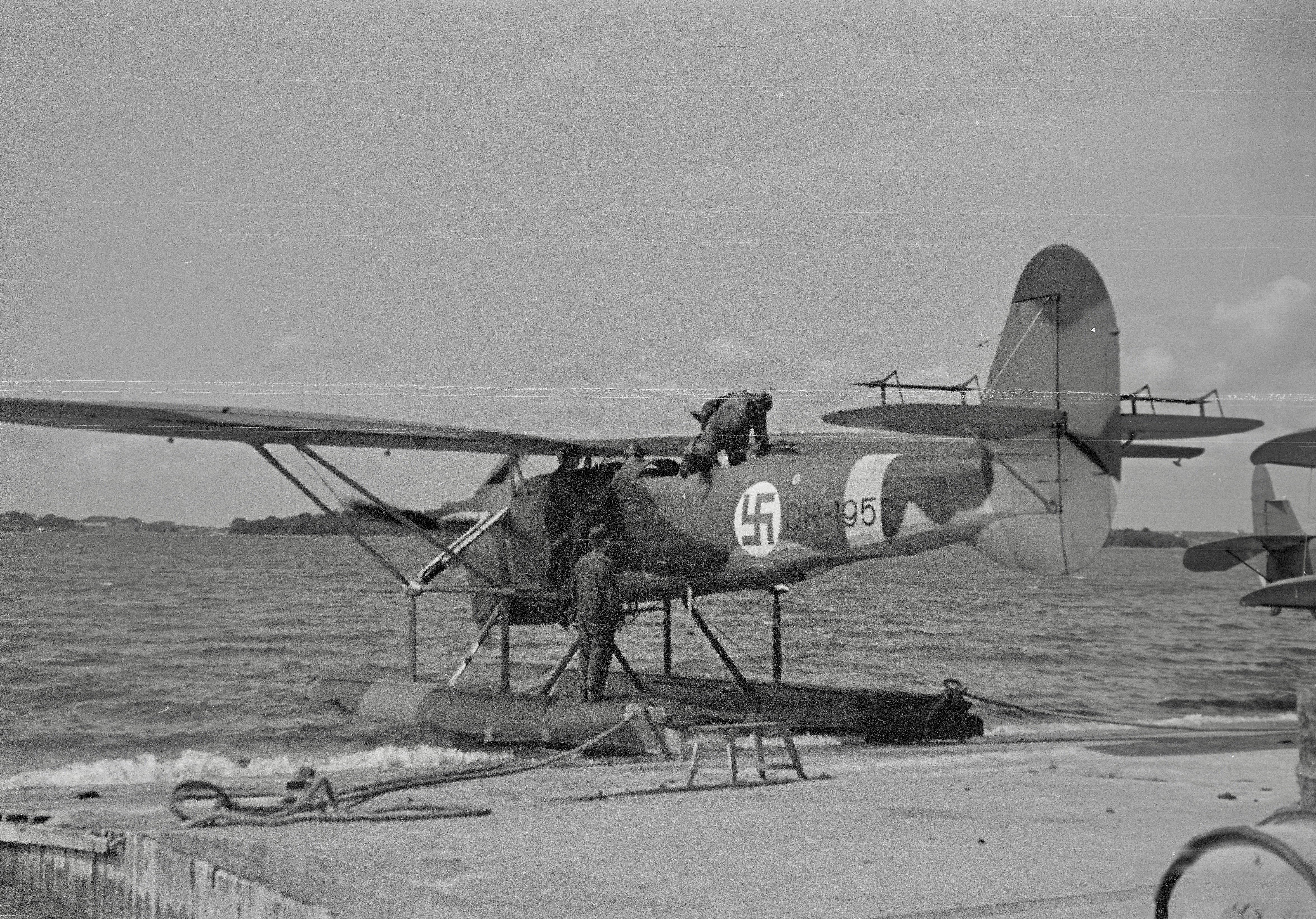 Meritiedustelukone lähdössä. (Kuvassa on Dornier Do 22 (tunnus DR-195)). Kuvauspaikka: Santahamina